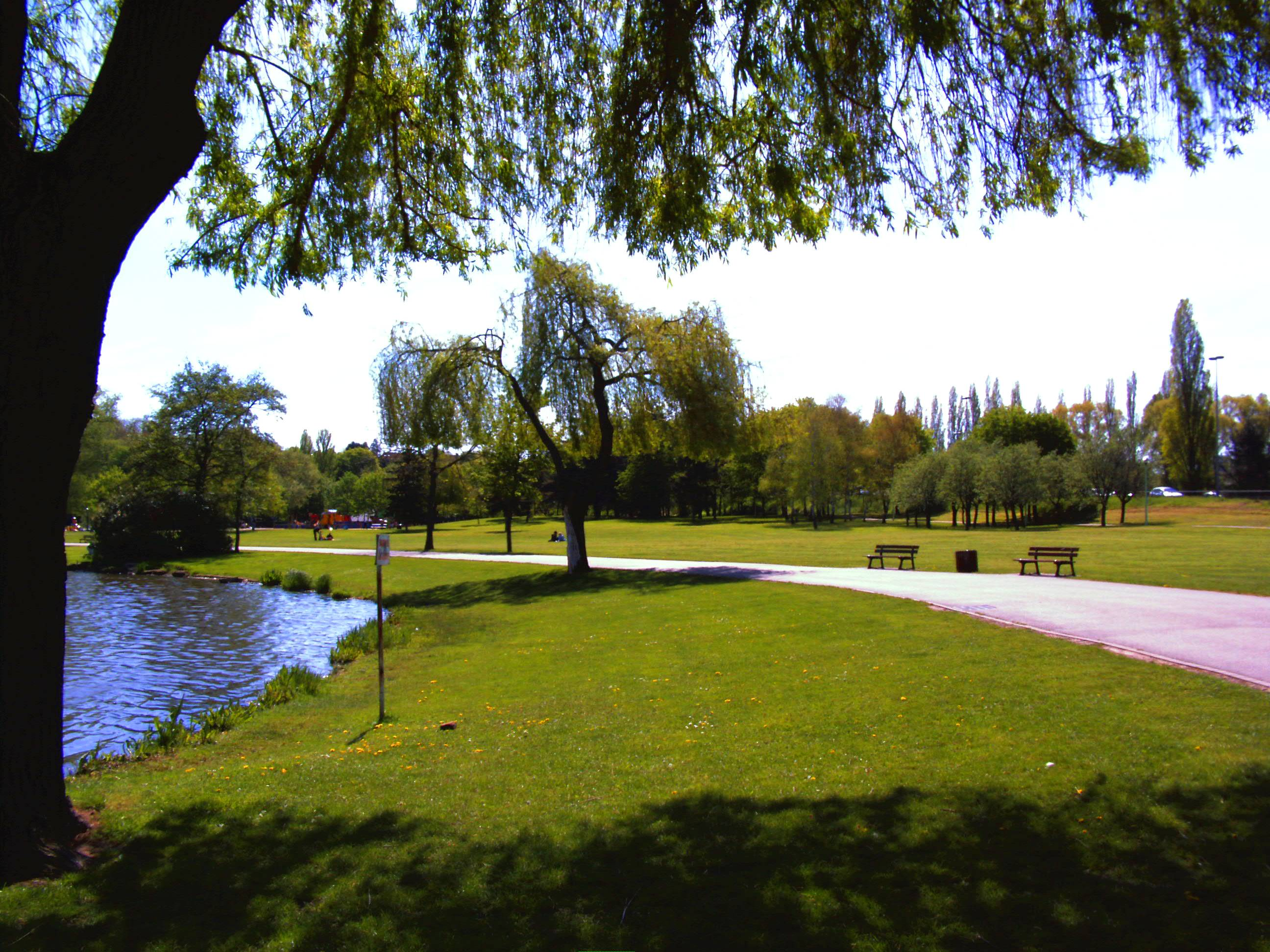 Le Plan d'Eau à Metz.